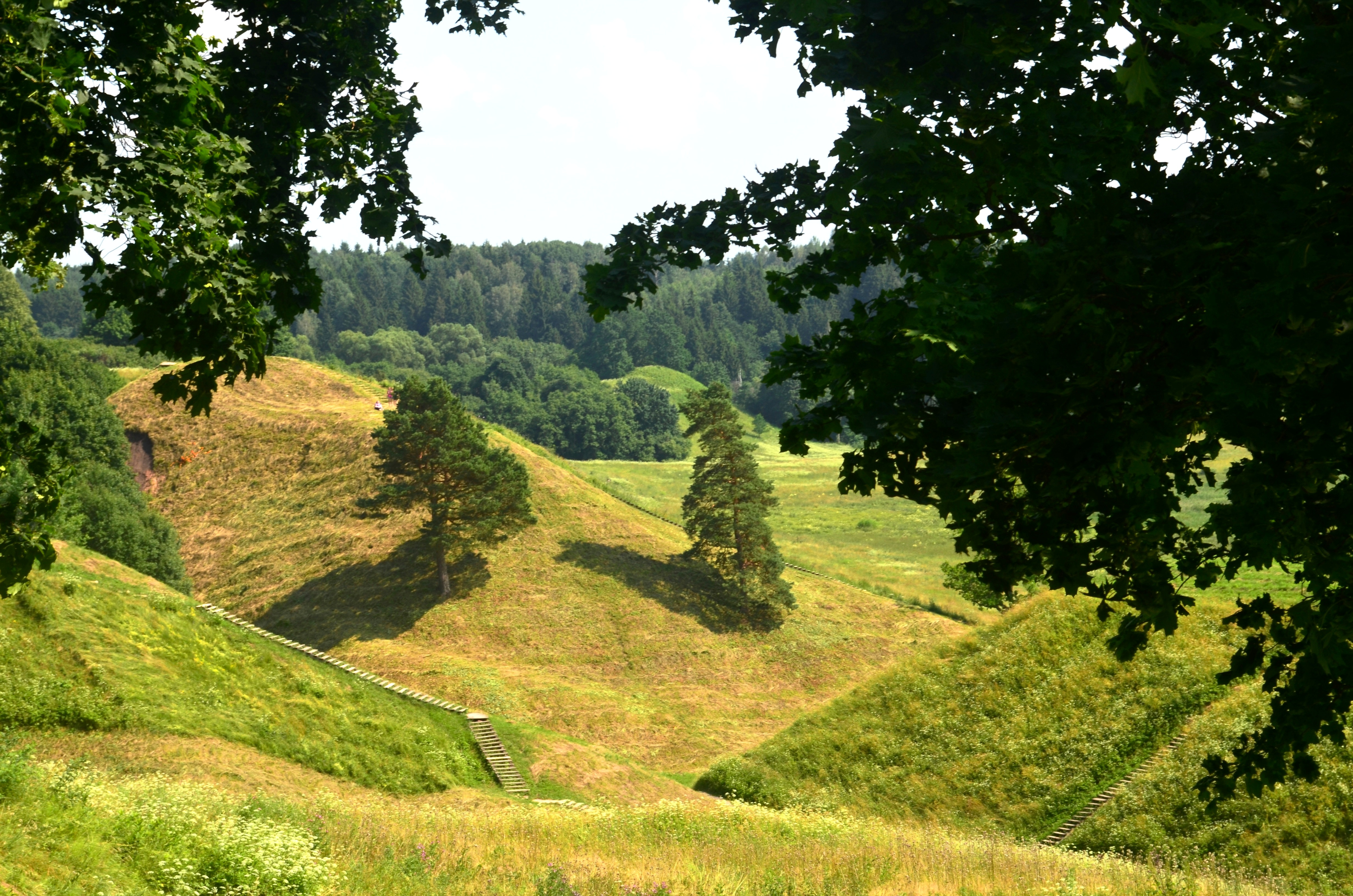 Kernavės piliakalniai, Širvintų raj.